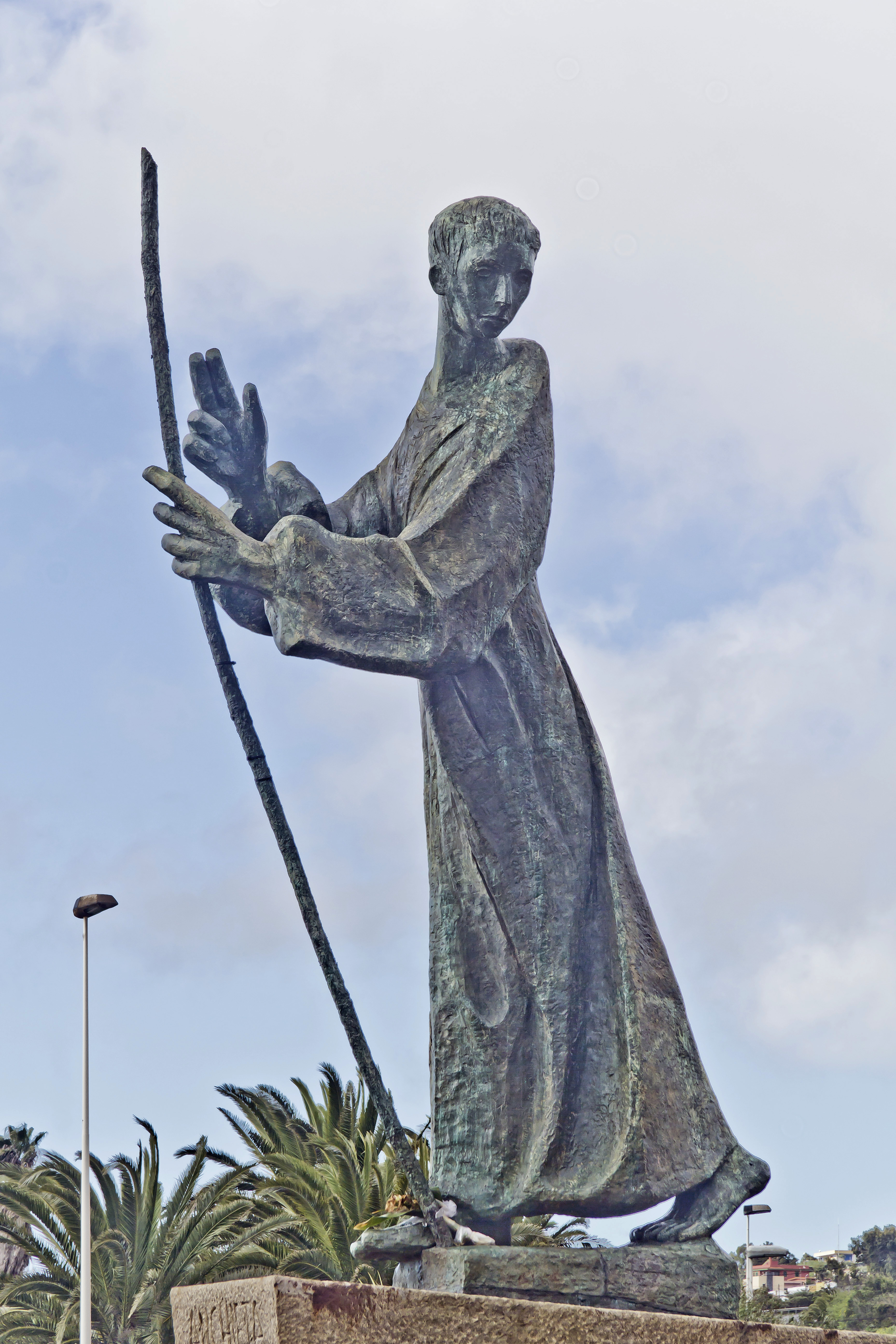 Escultura Padre Anchieta